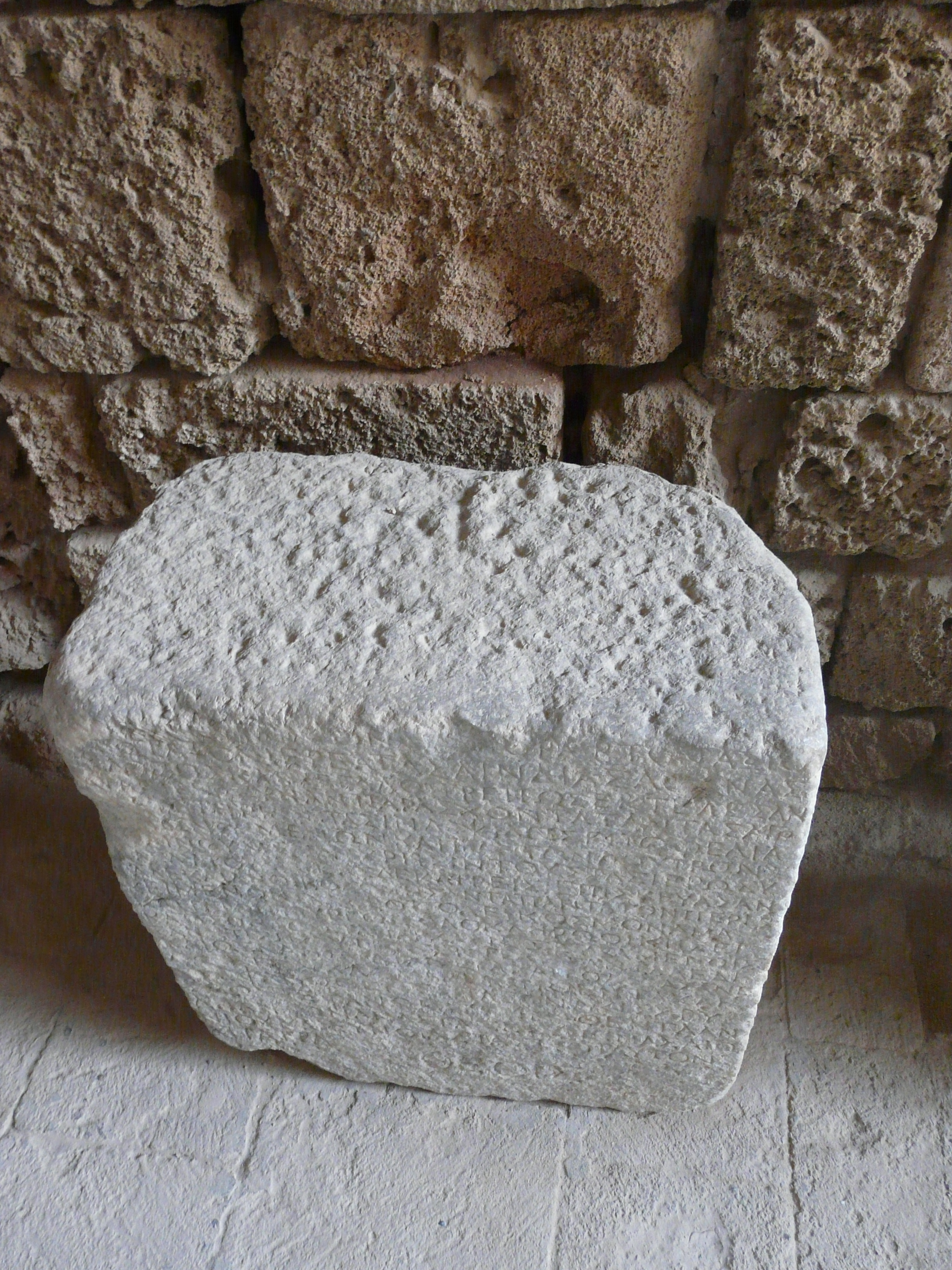 Lindos, Rhodes